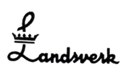 Landsverk ABs logotyp